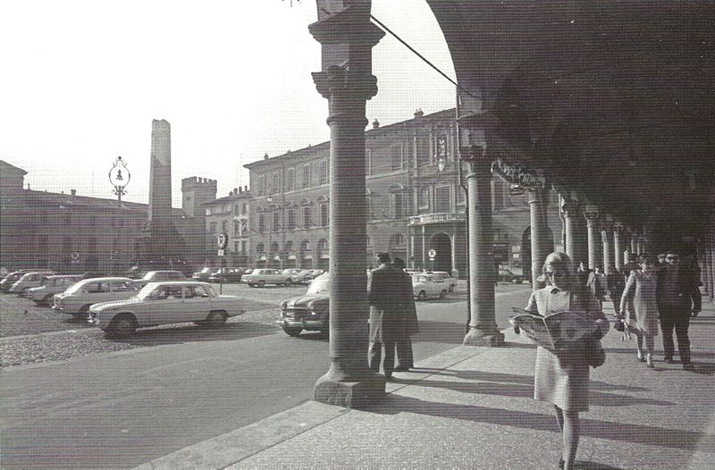 Imola. Piazza Matteotti negli anni '60.